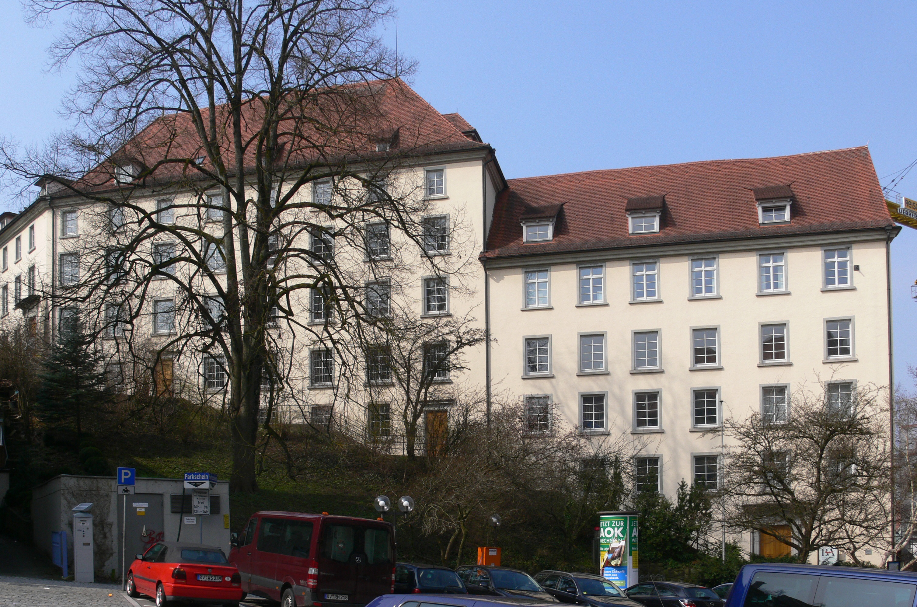 Ravensburg, ehemaliges Kloster St. Michael, später Gymnasium und Handelsschule, heute Arbeitsgericht (Arbeitsgericht Ulm - Kammern Ravensburg; 4. Obergeschoss) und Berufsakademie; am Aufgang von der Marktstraße/Burgstraße zum Mehlsack